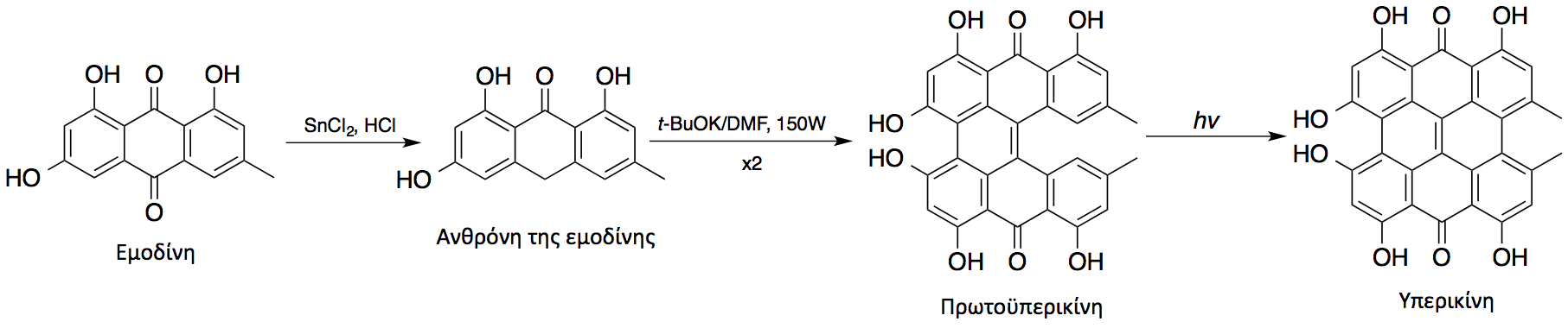 Ημισύνθεση της υπερικίνης από την εμοδίνη με τη χρήση μικροκυμάτων